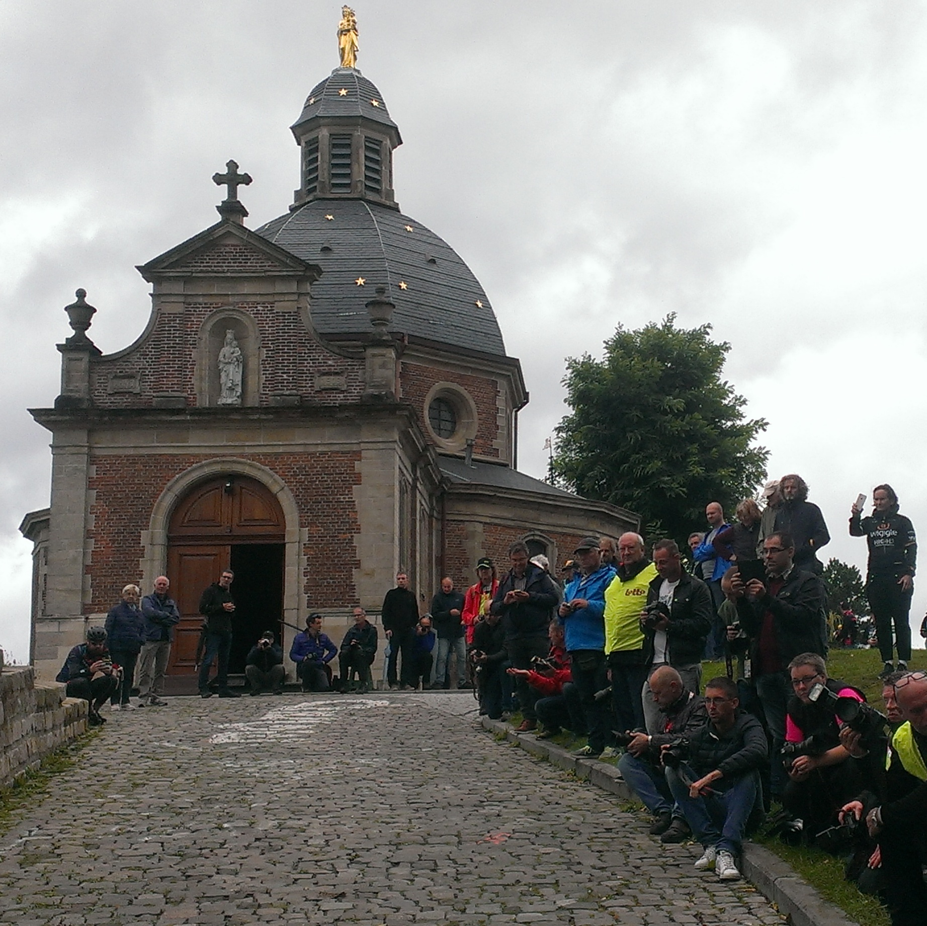 3e en laatste etappe van de Lotto Belgium Tour 2017 op de Muur / Kapelmuur van Geraardsbergen.